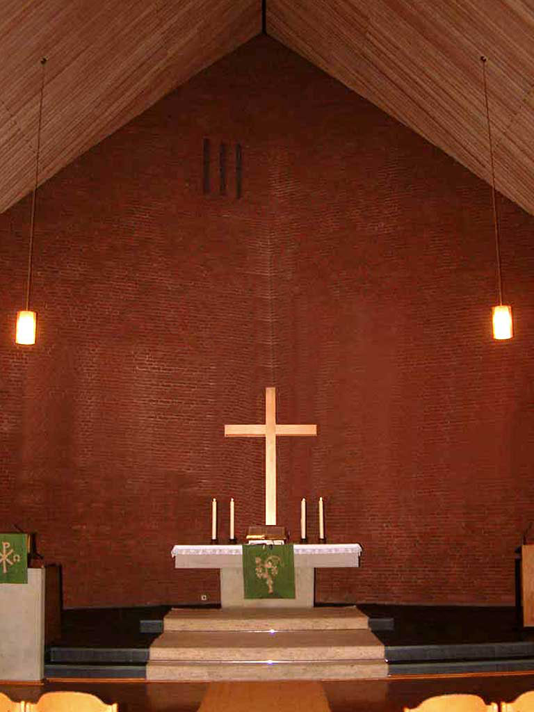 Dieses Bild wurde bearbeitet. Das Altarbild wurde entfernt, dafür das alte Kreuz nach Berichten von Gemeindegliedern eingefügt.